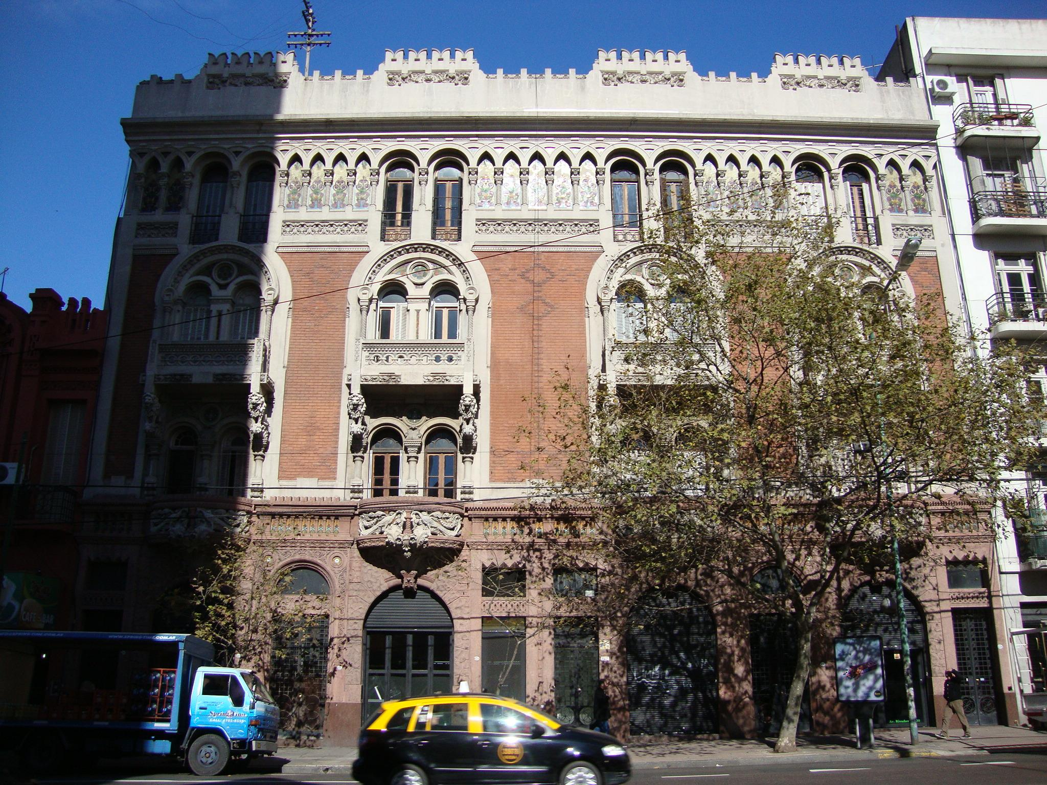 "Casa de los Pavos Reales", edificio de viviendas y locales comerciales construido por el arquitecto milanés Virginio Colombo hacia 1912. Estilo: Ecléctico (Liberty milanés). Dirección: Av. Rivadavia 3216/22/36. Uso: Edificio de los Pavos Reales Bed & Breakfast. Buenos Aires, Argentina.